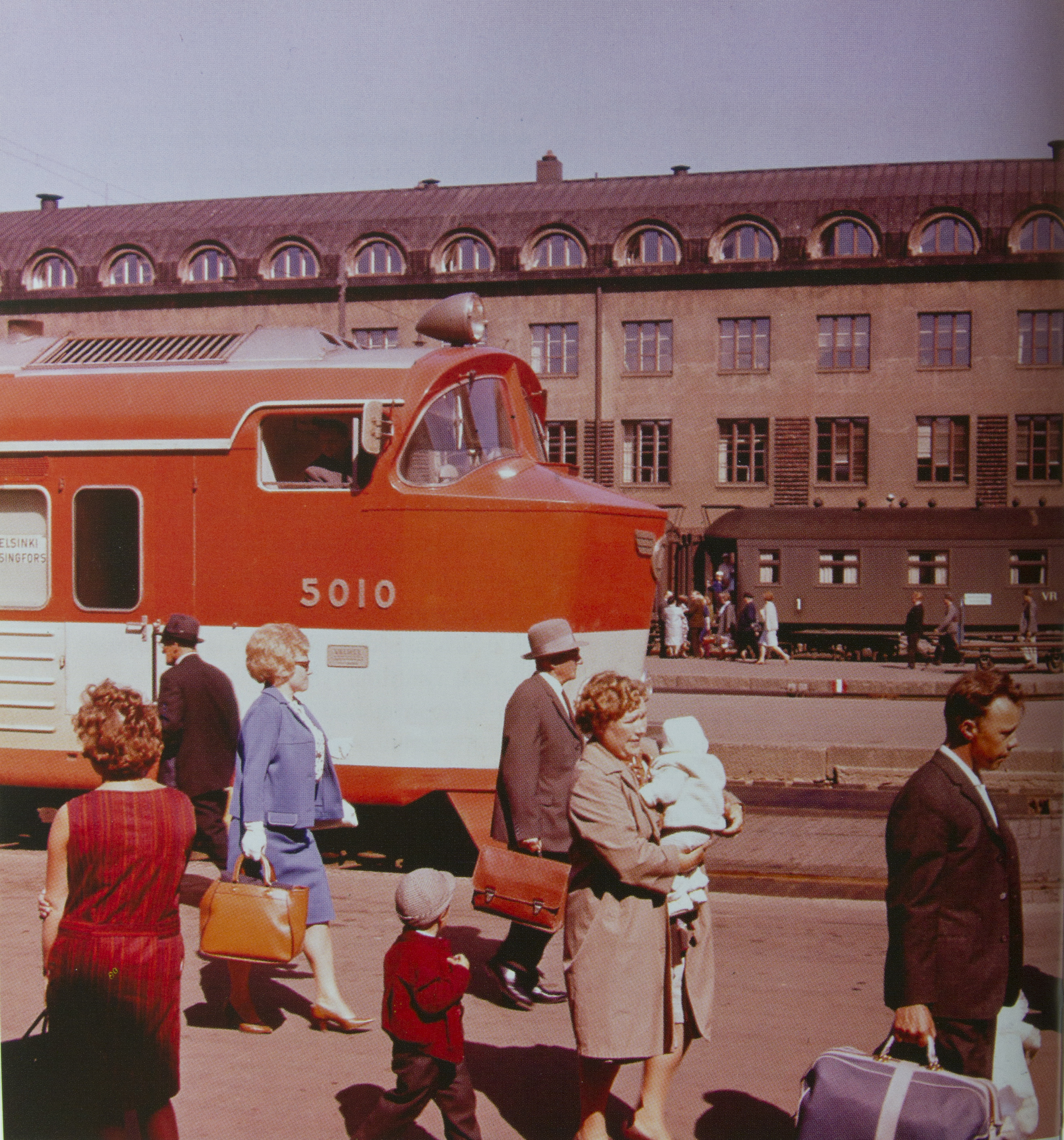 Helsingin päärautatieasema vuonna 1965. Kiitojuna Dm8 on juuri saapunut Helsinkiin.